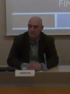 El Sueño de una Internacional de naciones oprimidas, 1912-1939. III. Universitat Pompeu Fabra 2017.